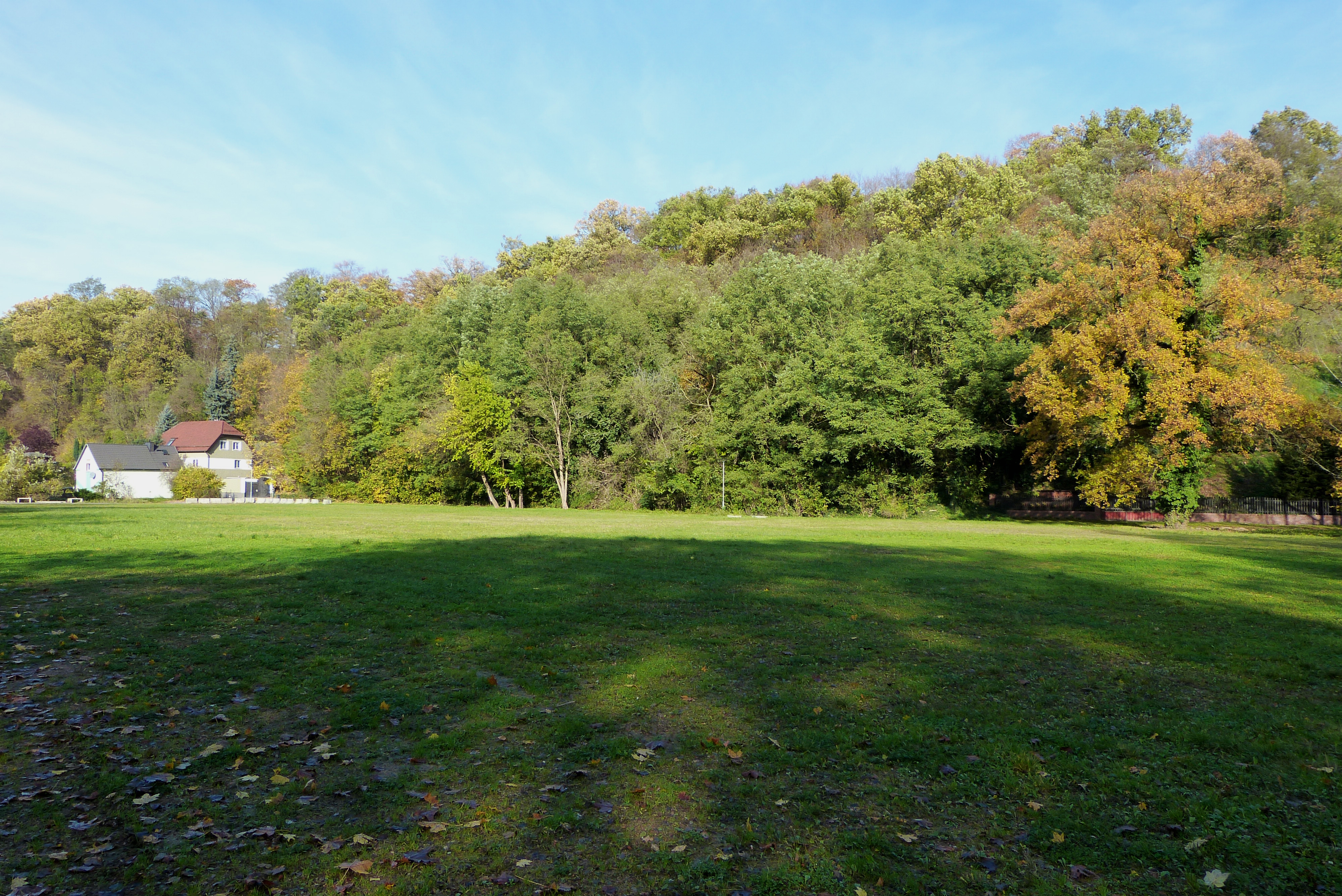 Sicht auf die Anhöhe des Georgenberg von der Stadt Spremberg aus, hier entlang der Wiesengasse.